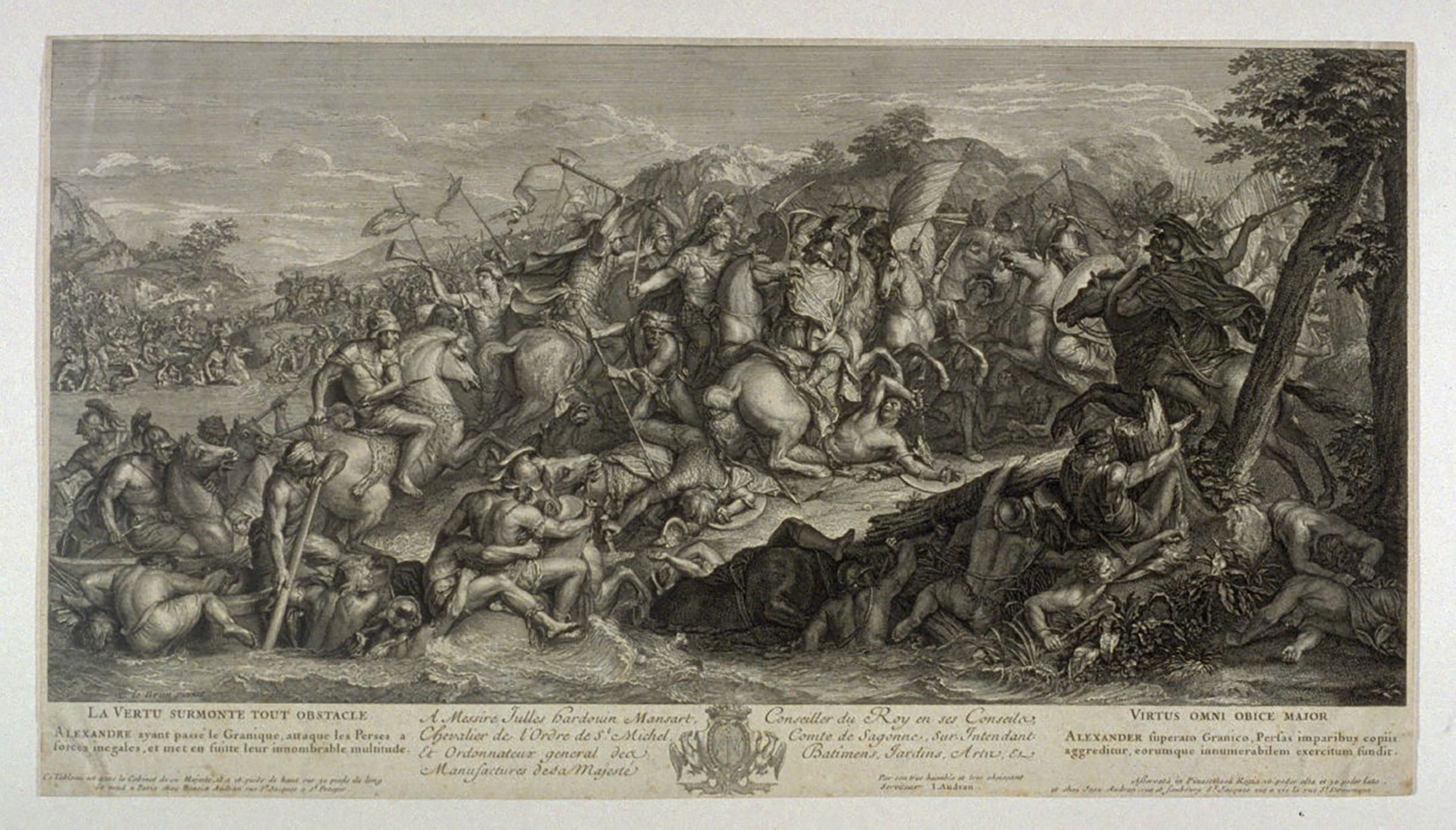 gravure